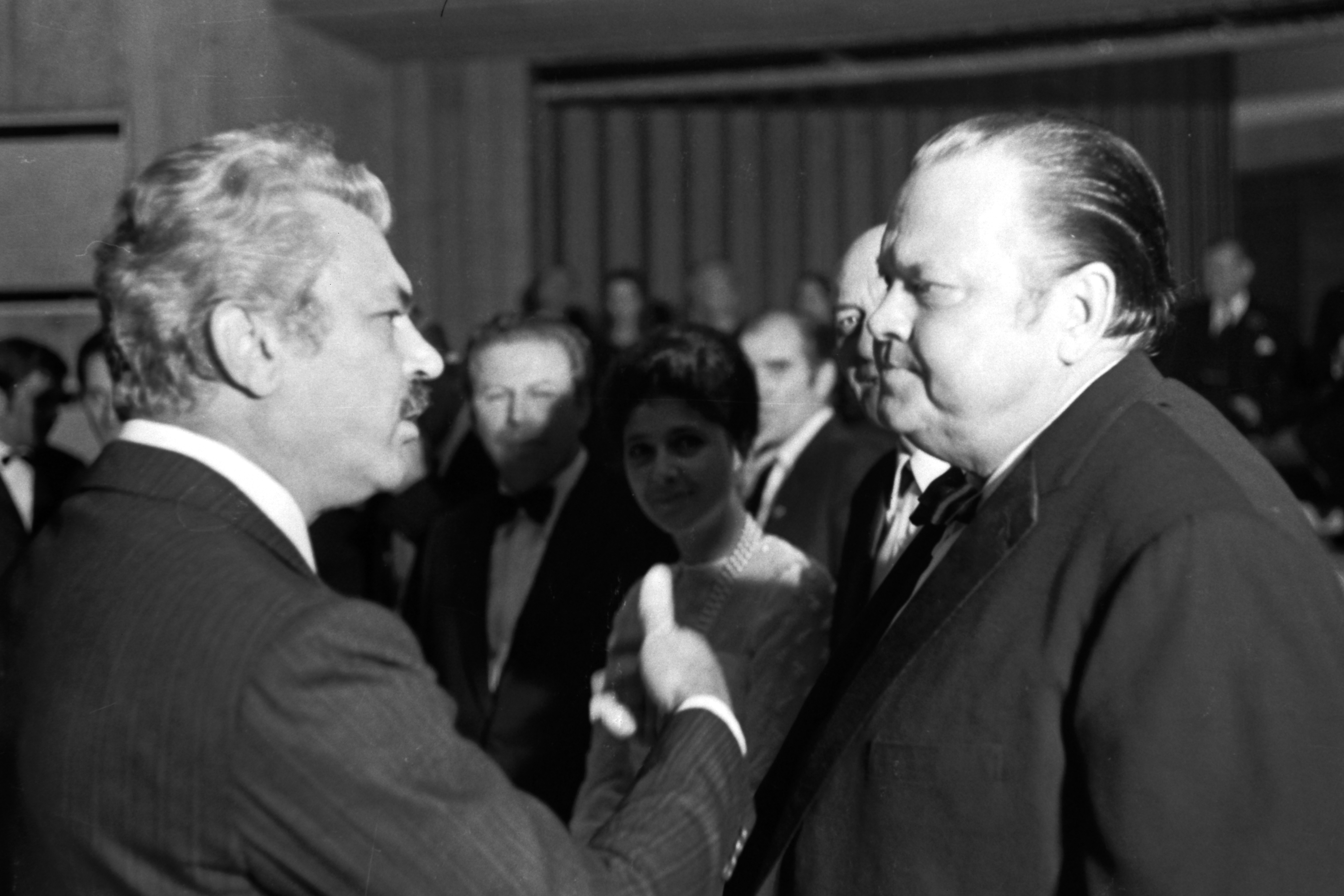 Stevan Kragujević foto: Sergej Bondarčuk i Orson Vels, Sarajevo, 29. novembar 1969. godine. Premijera filma Bitka na Neretvi (po odobrenju Tanje Kragujević, kćerke S. Kragujevića)